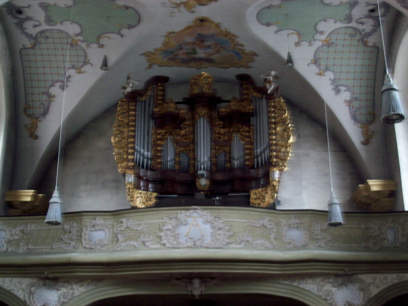 Sandkirche Aschaffenburg Orgelempore